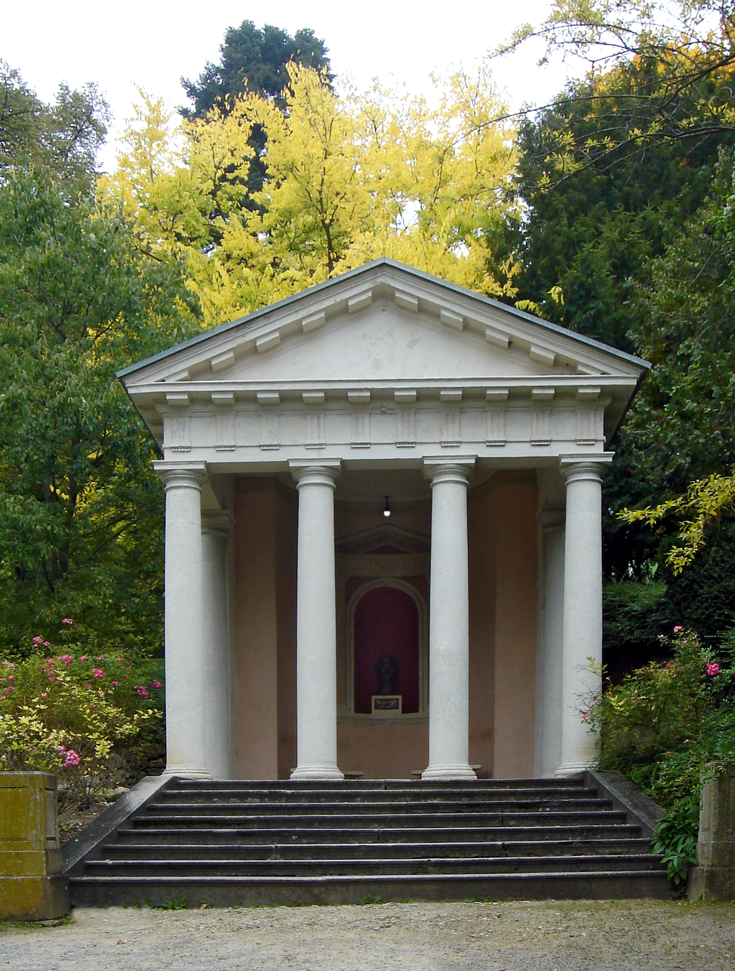 Baden bei Wien, Kurpark, Mozart-Tempel (früher: Äskulap-Tempel)